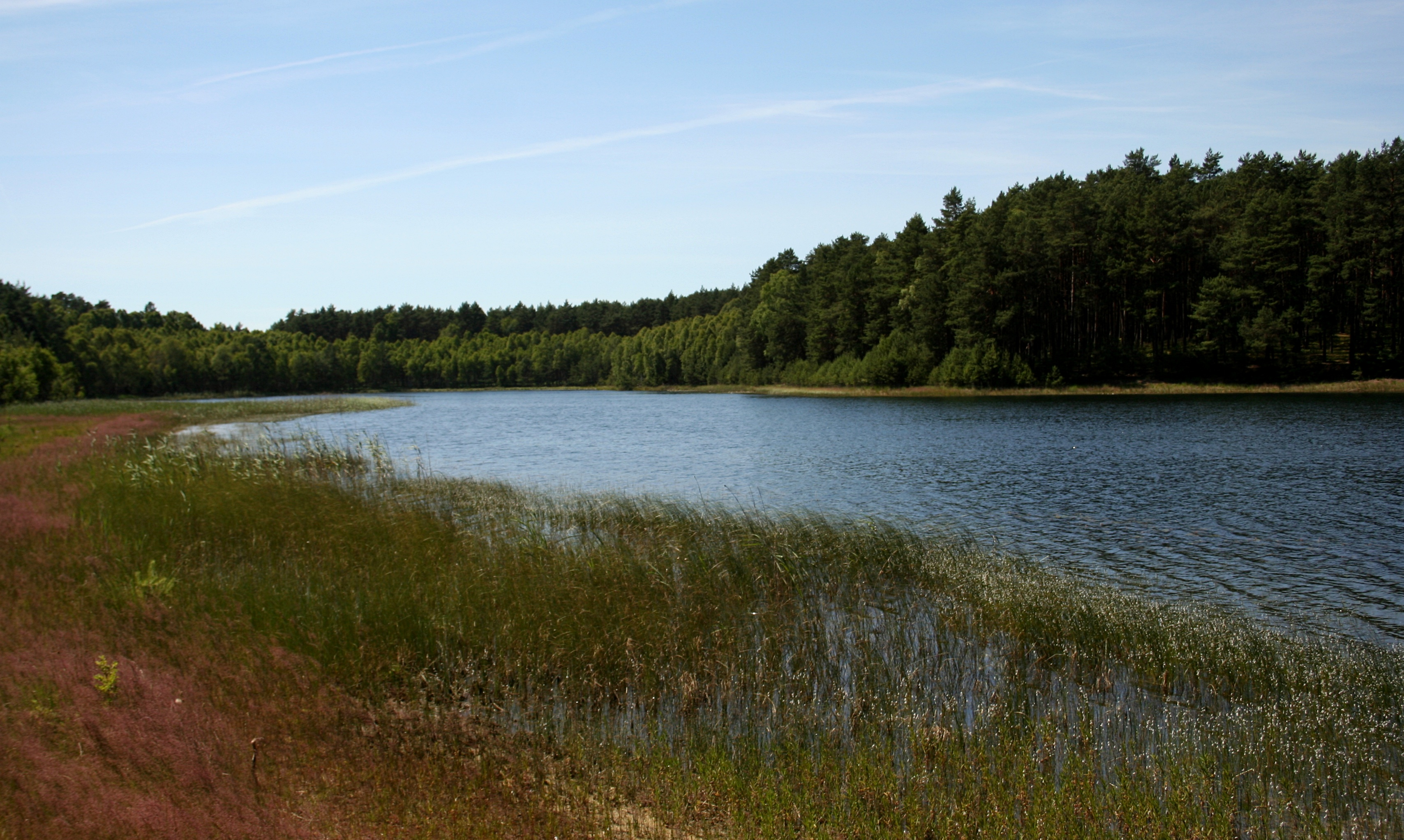 Park Narodowy Bory Tucholskie, brzeg jeziora Wielkie Gacno